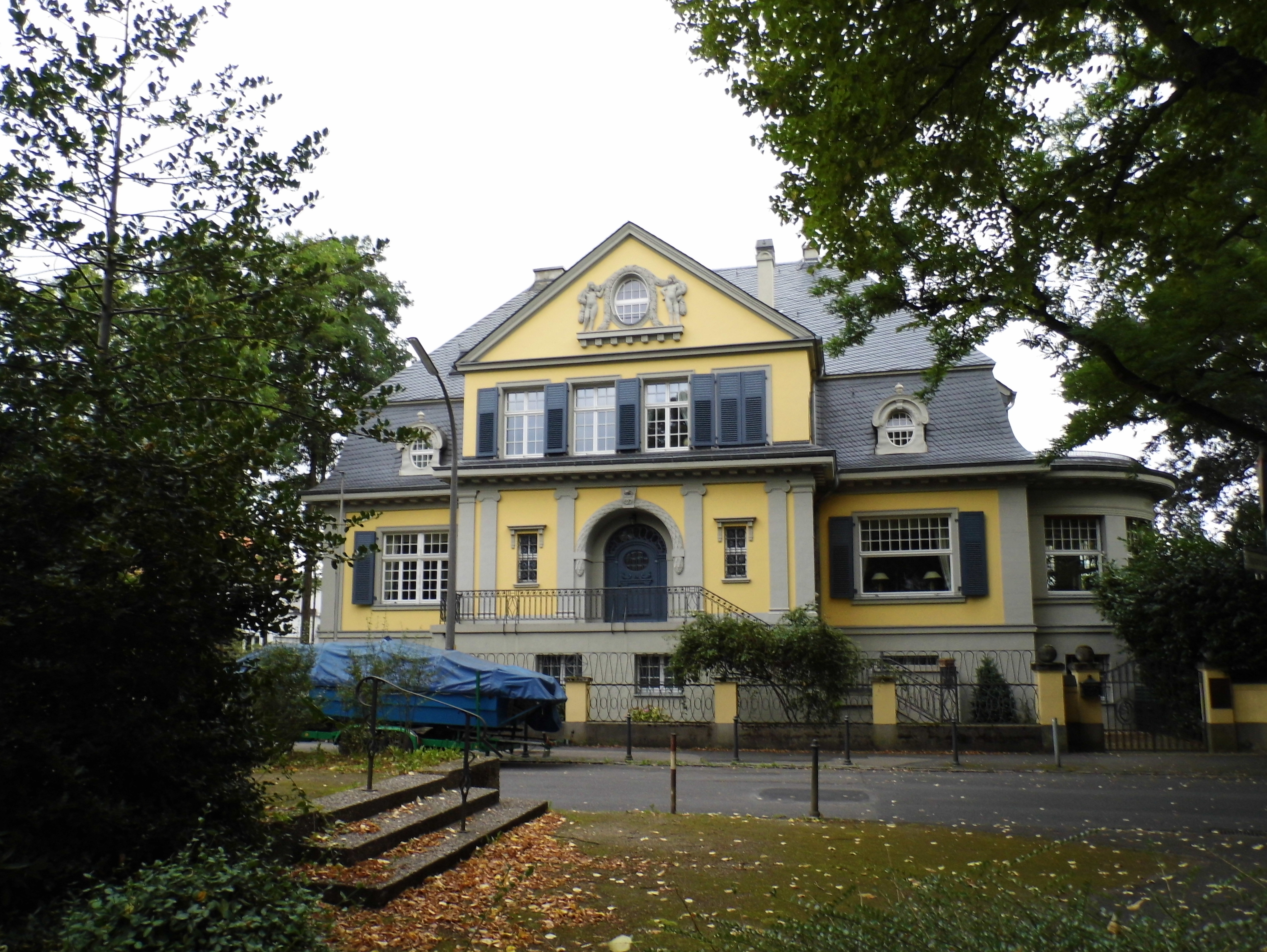 Denkmalgeschützte Villa Kronprinzenstraße 2 (ehemalige Botschaft von Ägypten) in Rüngsdorf, Bad Godesberg